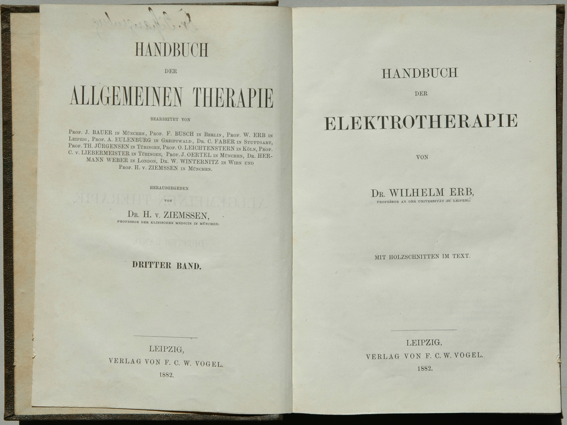 Erstausgabe/Erstdruck